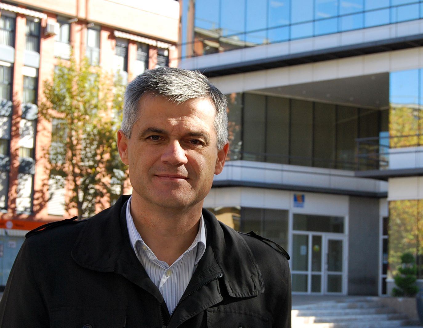 David Lucas, Alcalde de Móstoles